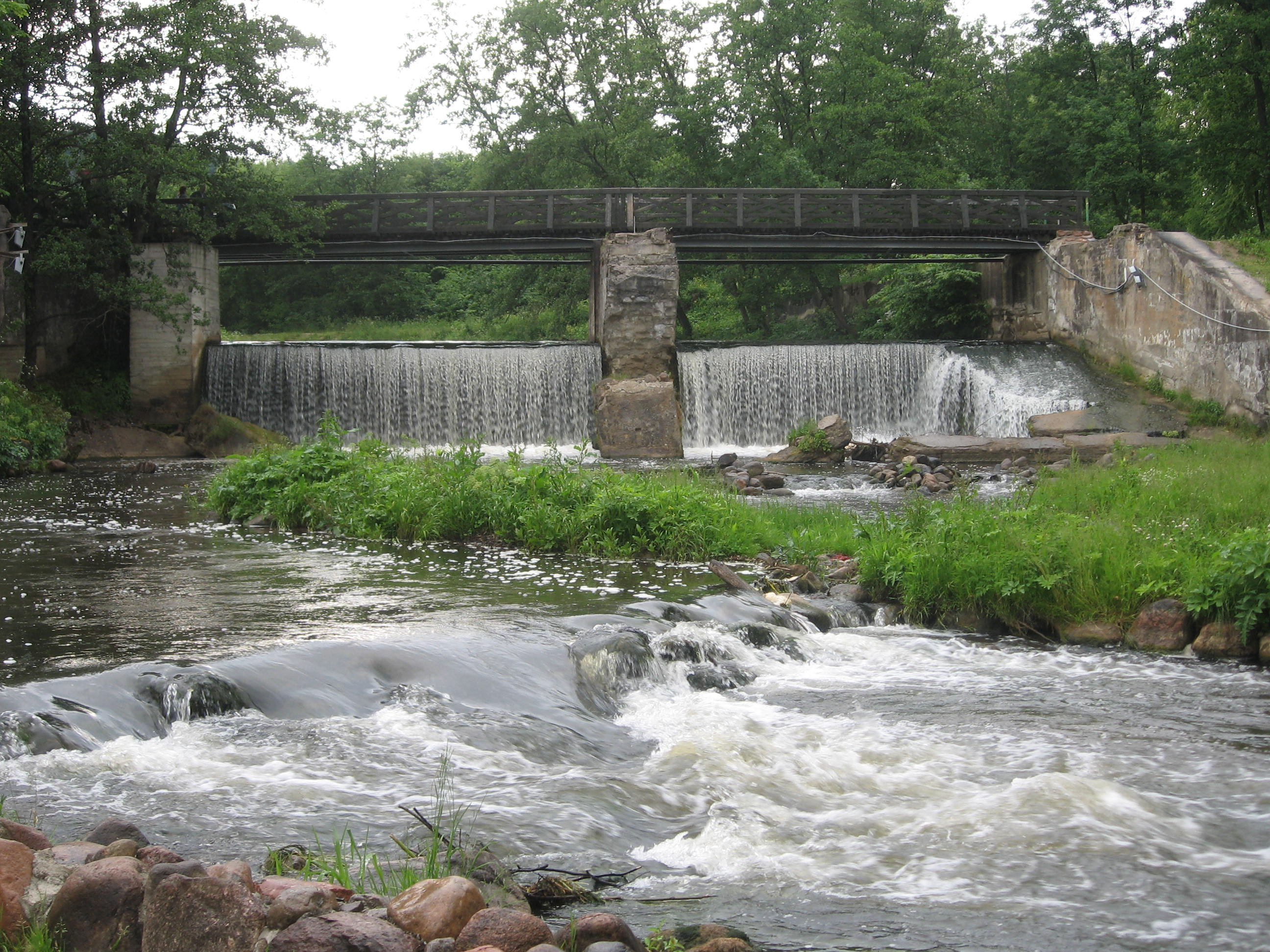 Krioklys Belmonte